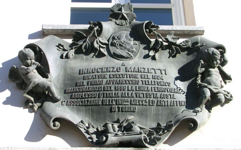 Targa posta sulla casa natale di Innocenzo Manzetti ad Aosta, in via Xavier de Maistre 32. Reca incisa la dedica: A INNOCENZO MANZETTI / IDEATORE ESECUTORE NEL 1864 / DEL PRIMO APPARECCHIO TELEFONICO / INAUGURANDOSI NEL 1886 LA LINEA FERROVIARIA / AMPLESSO D'ITALIA ALLA VETUSTA AOSTA / L'ASSOCIAZIONE DELL'IND(UST)RIA MECC(ANIC)A ED ARTI AFFINI / DI TORINO